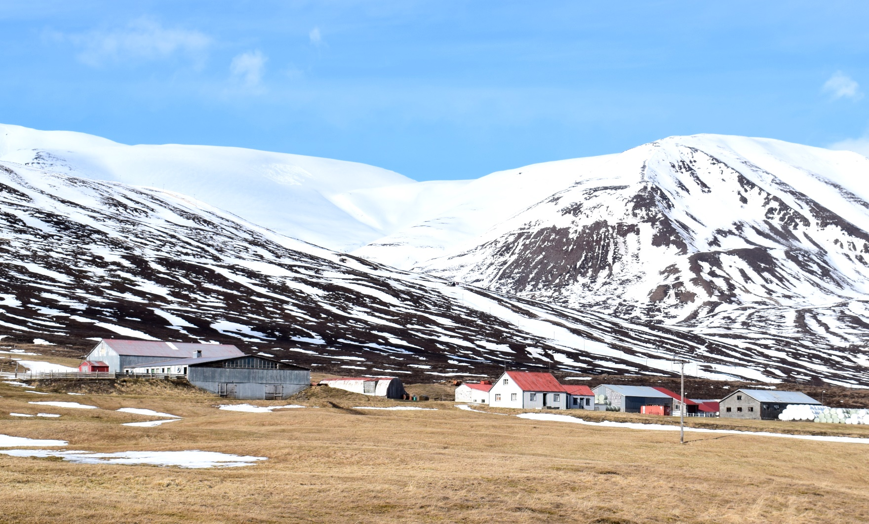 Hrappsstaðakot í Svarfaðardal